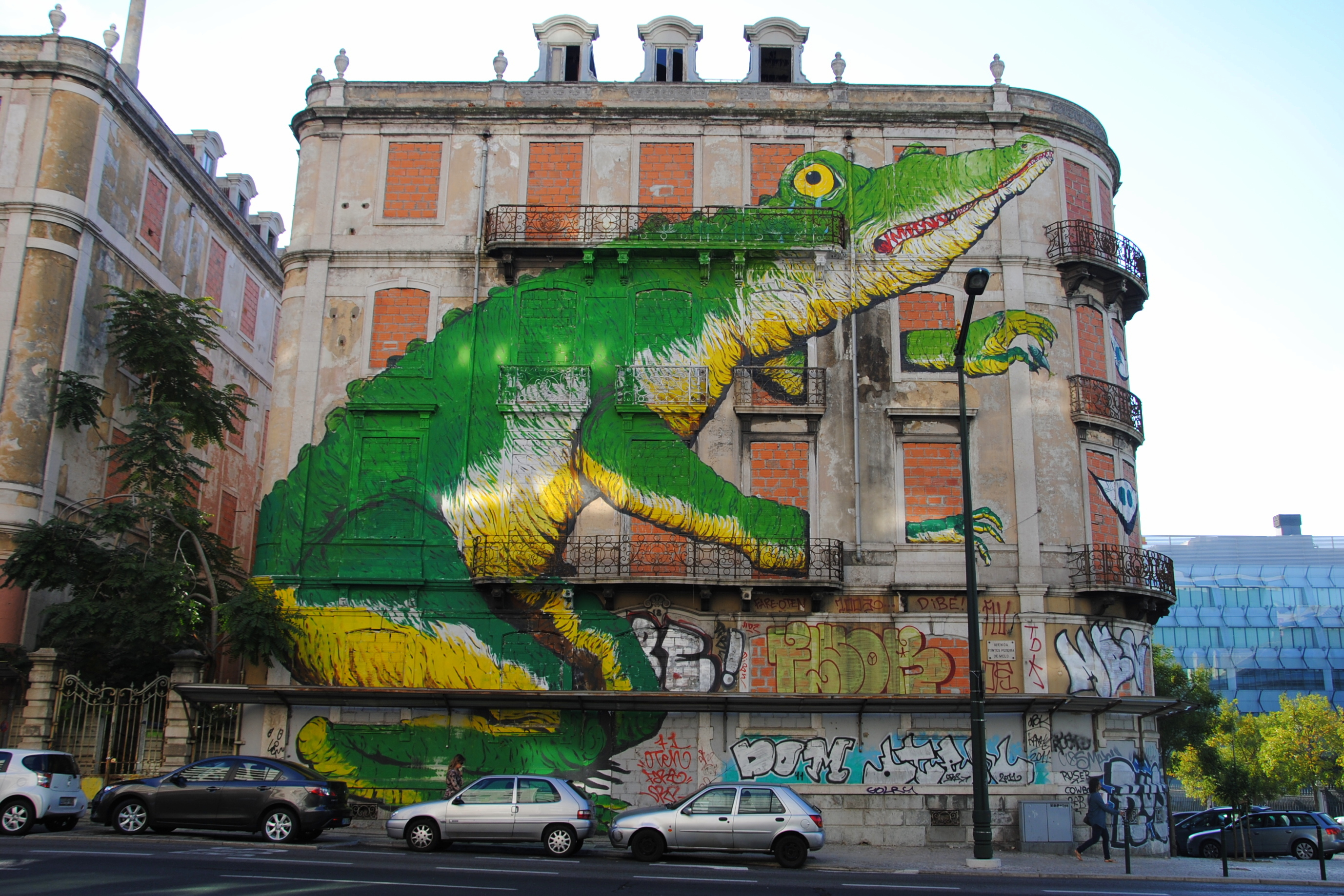 Grafite em prédio abandonado. Lisboa, Portugal.